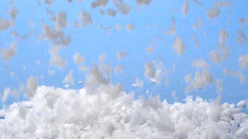 Kunstschnee fallend, Display Snow Coarse